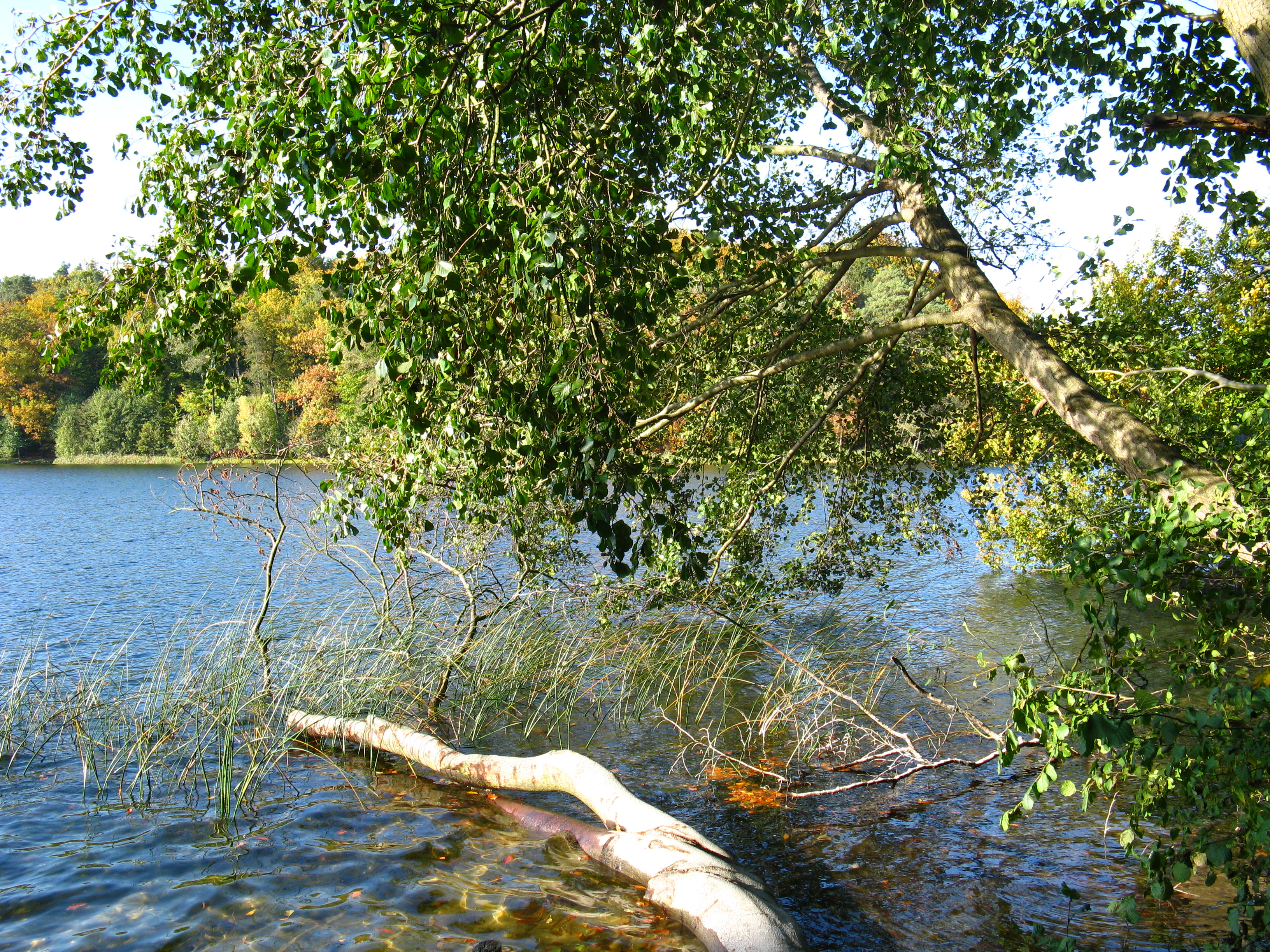 Ufer auf der Insel Großer Werder im Liepnitzsee